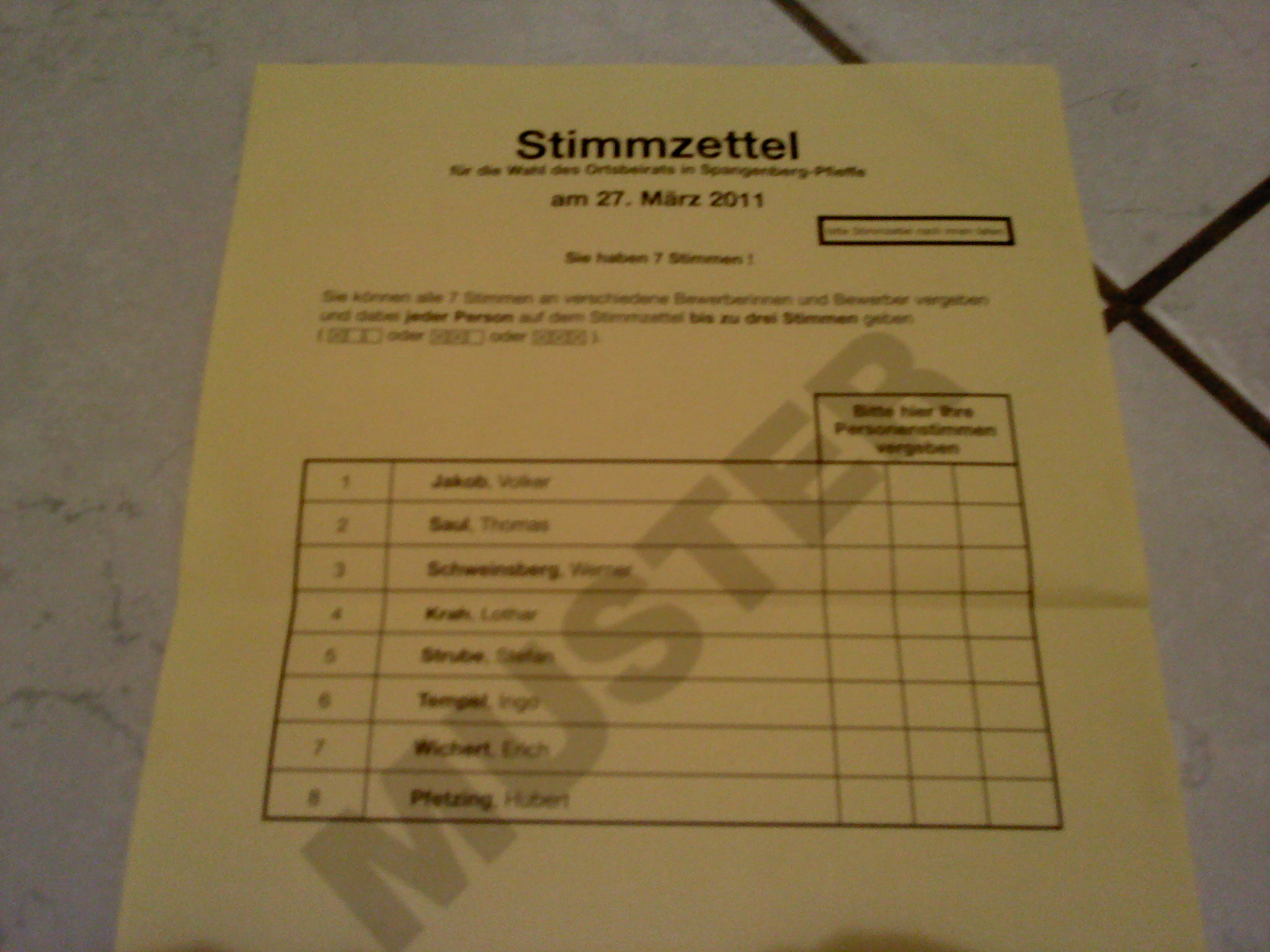 Musterstimmzettel zur Wahl des Ortsbeirates am 27. März in Spangenberg-Pfieffe